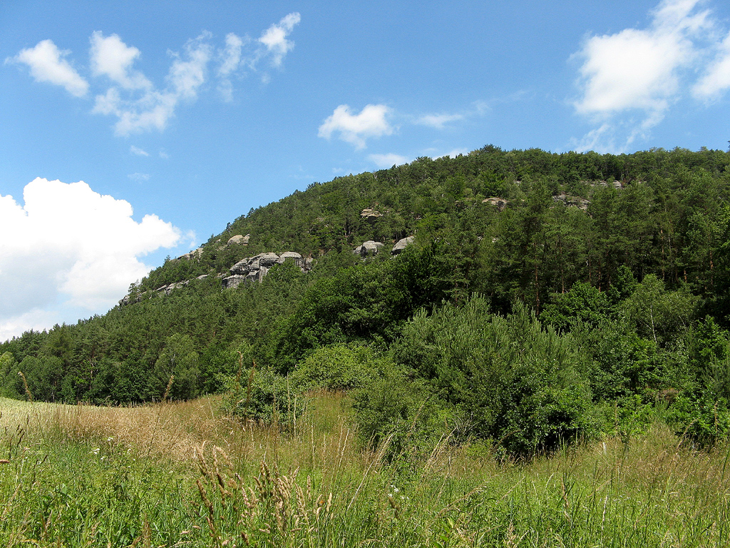 Výlet na Vlho%u0161%u0165 a Ronov 24. 6. 2007